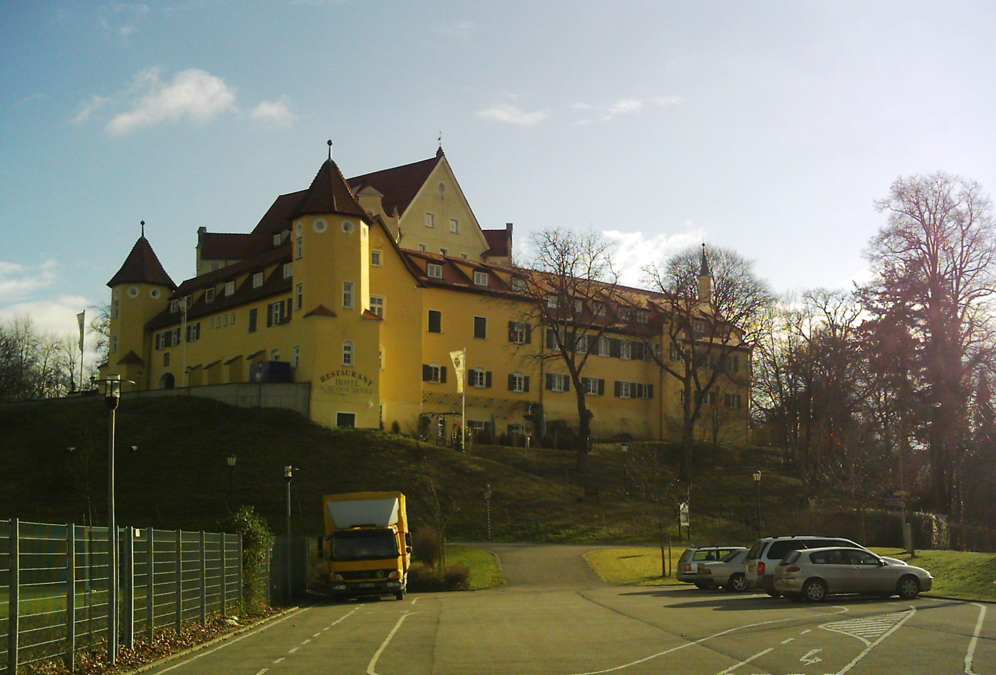 Erolzheimer Schloss